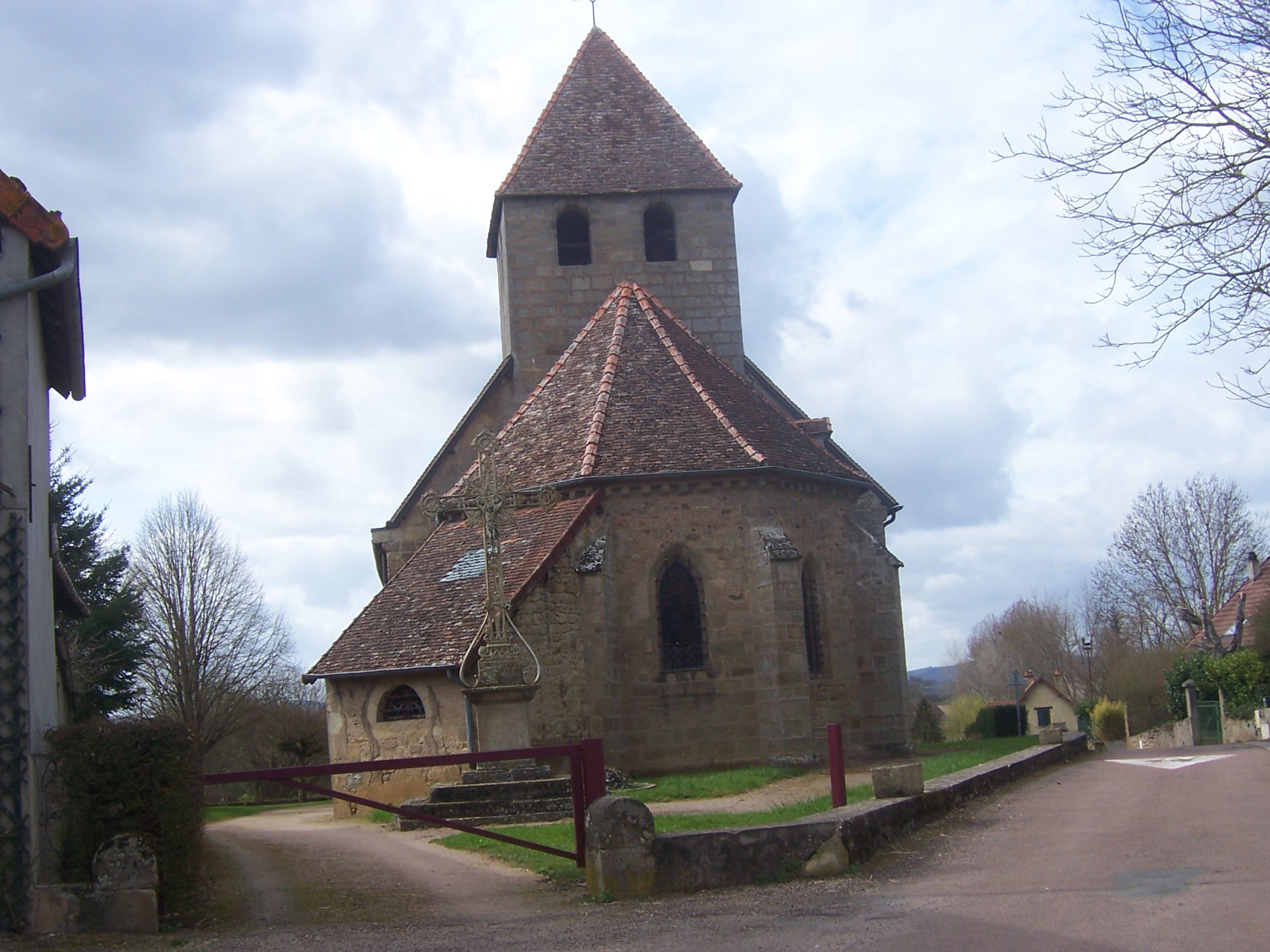 Eglise de Dracy-Saint-Loup